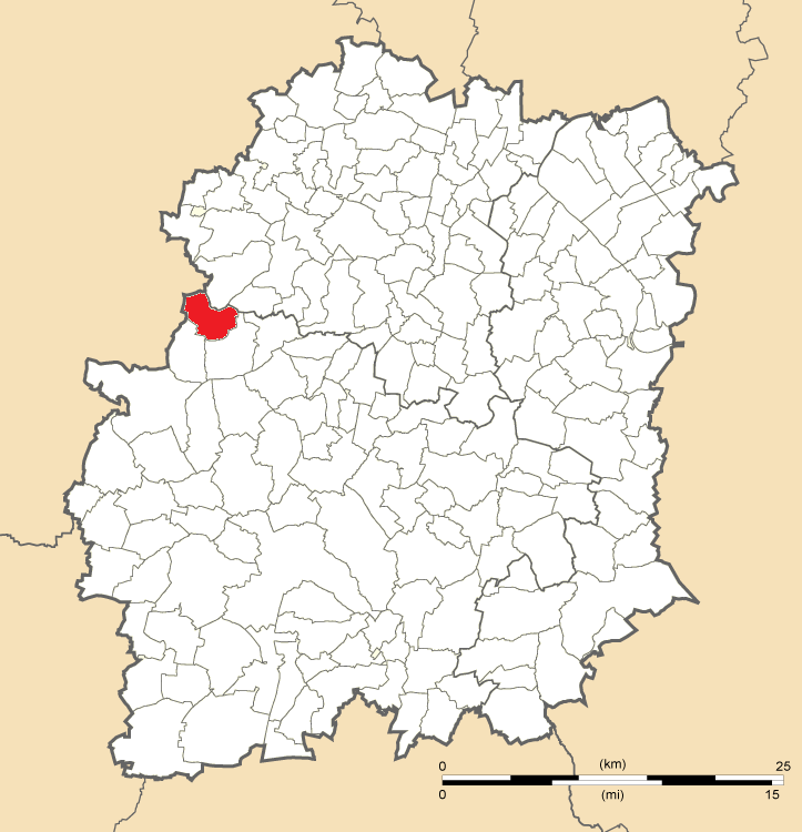 Carte de position d'Angervilliers en Essonne (91)